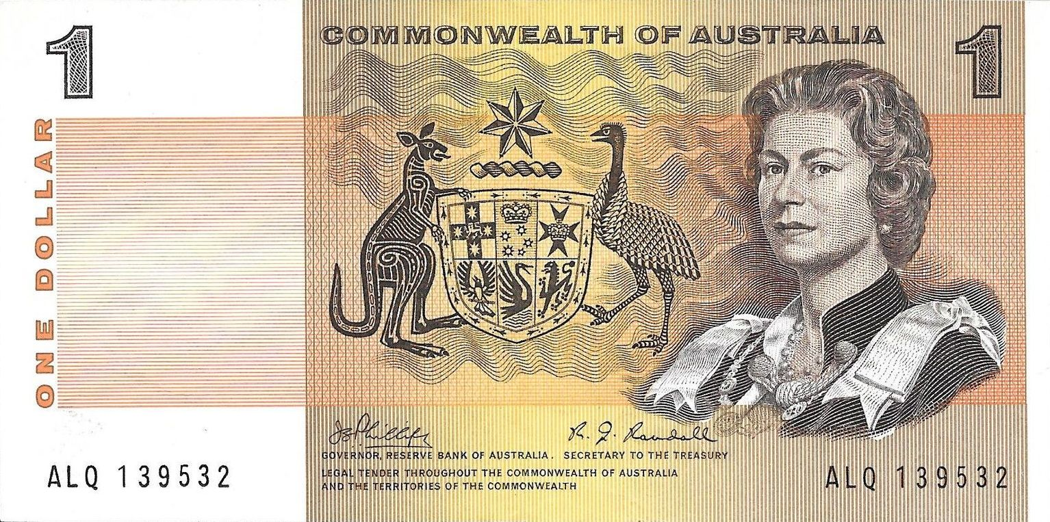 Az ausztrál 1 dolláros bankjegy előoldala II. Erzsébet királynő portréjával és Ausztrália címerével. A típust 1966 és 1983 között bocsájtották ki, valós mérete 140 x 70 mm.